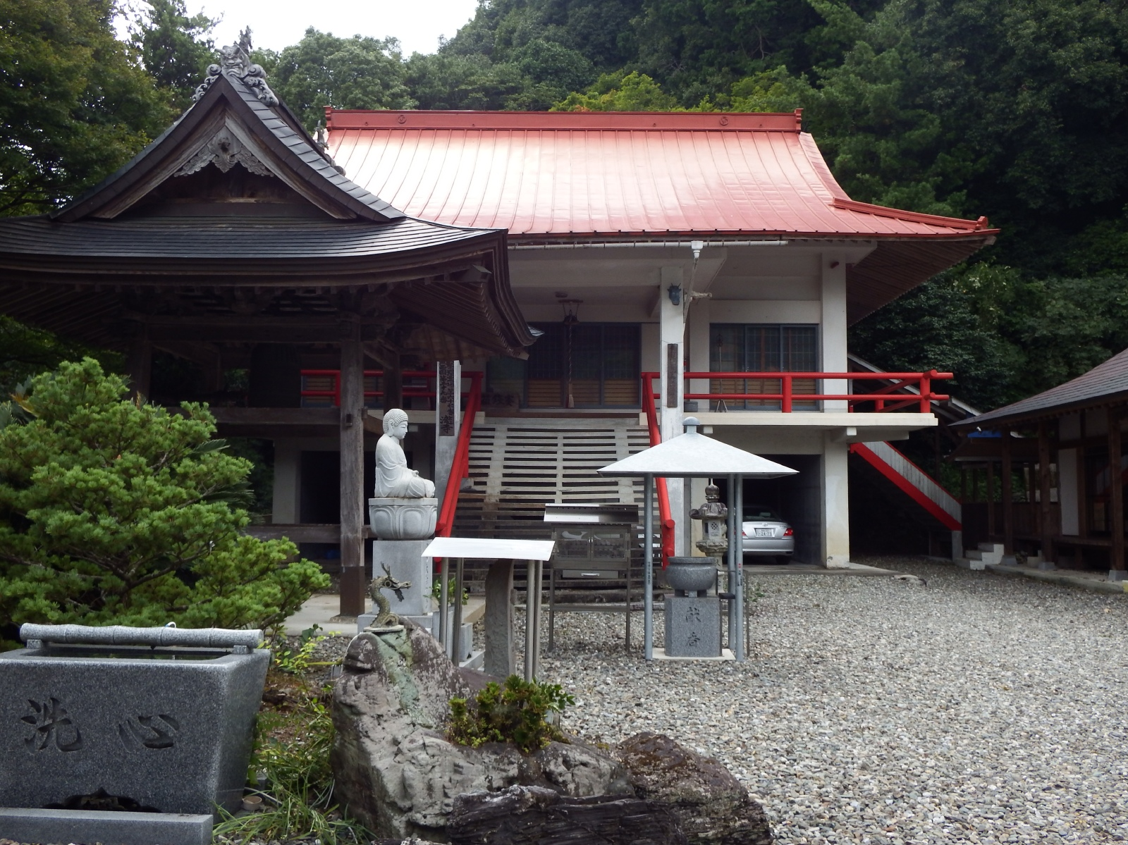 瀧寺の本堂